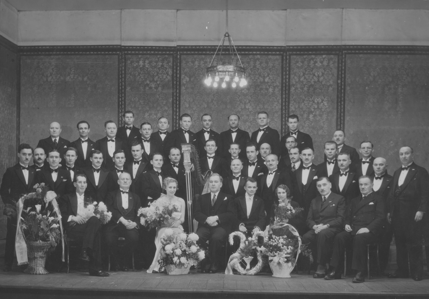 Kompozytor Adam Harasowski (siedzi 4. z prawej) z członkami chóru "Echo" i solistami. Katowice, 7 stycznia 1936, sygnatura 1-K-6529